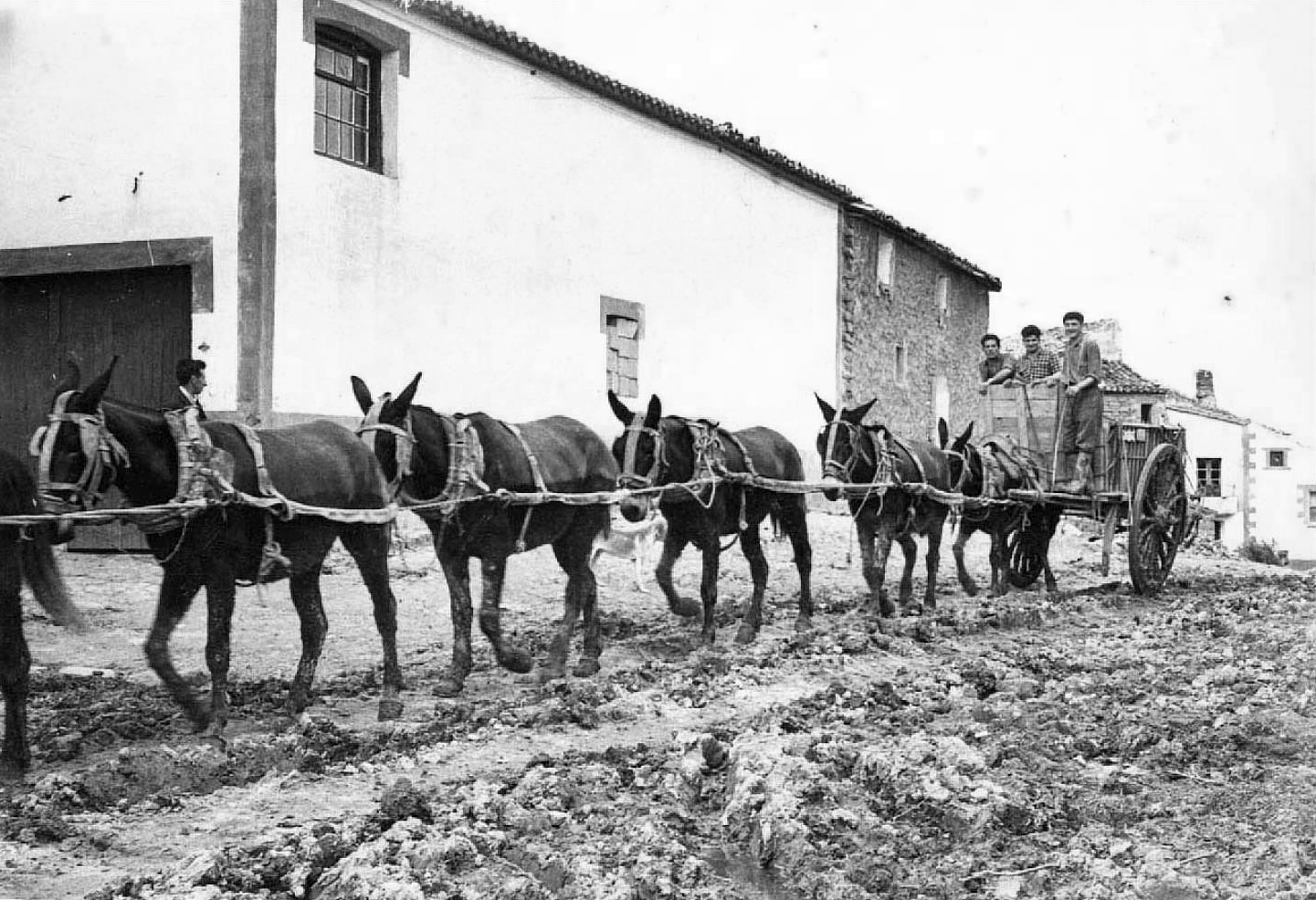 Trabajos en el campo.